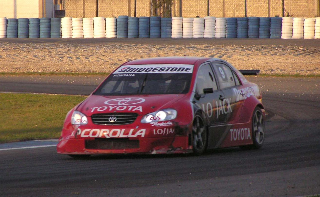 TC2000 "Toyota Team Argentina": Toyota Corolla #9 Norberto Fontana